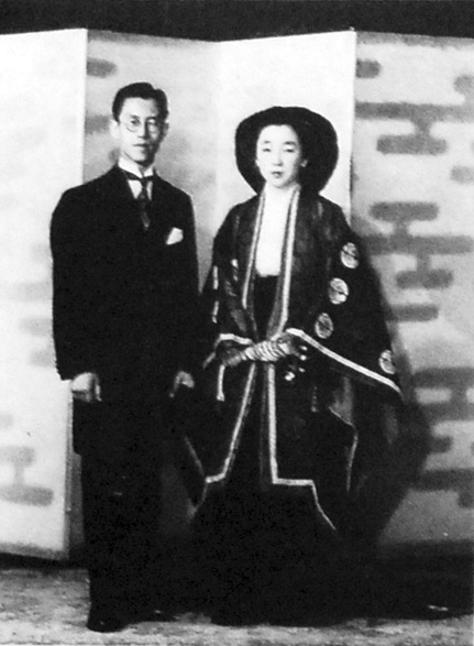 昭和天皇の皇女・和子(Kazuko)内親王と鷹司平通の結婚時の記念写真